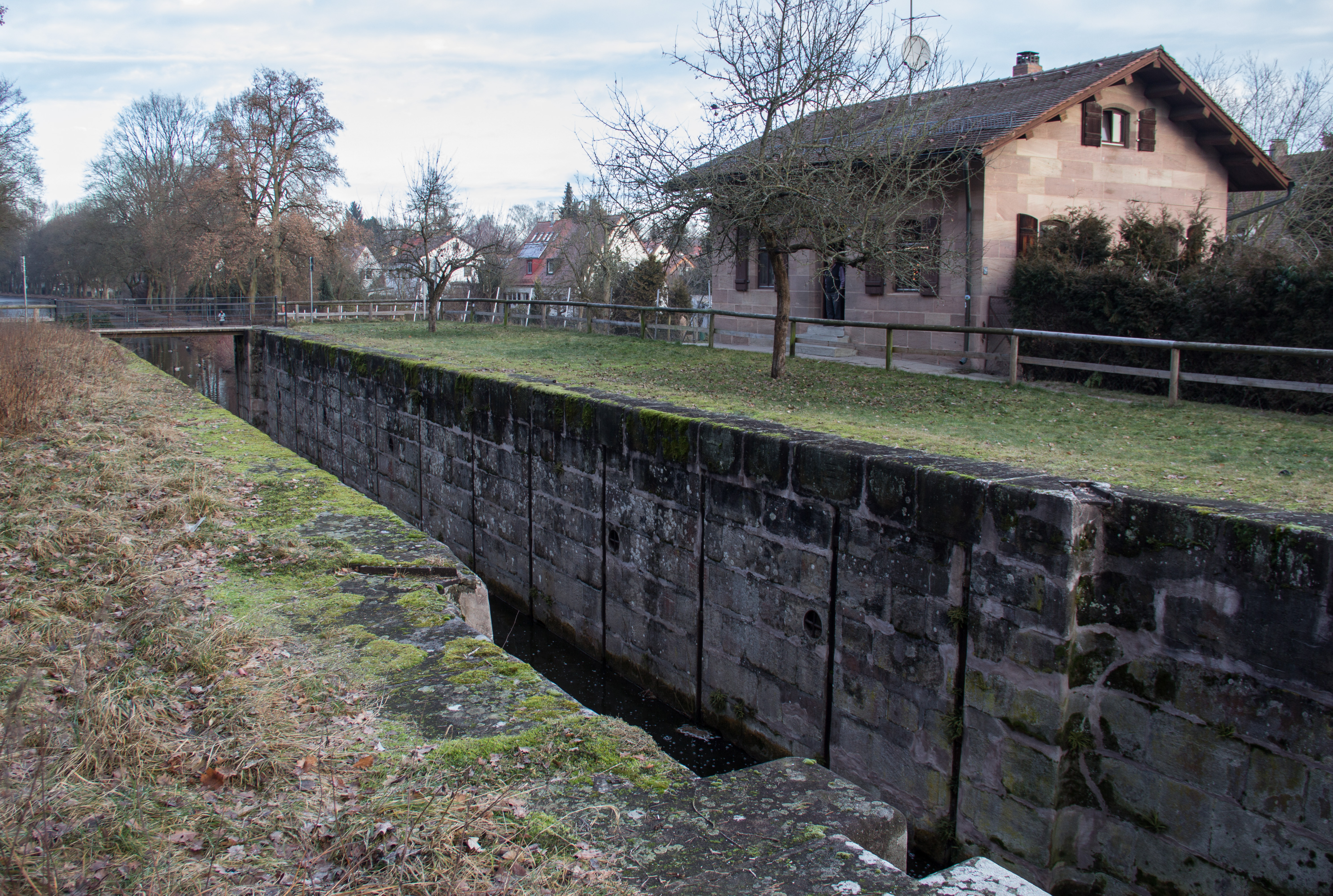 Schleuse 72, Ludwig-Donau-Main-Kanal